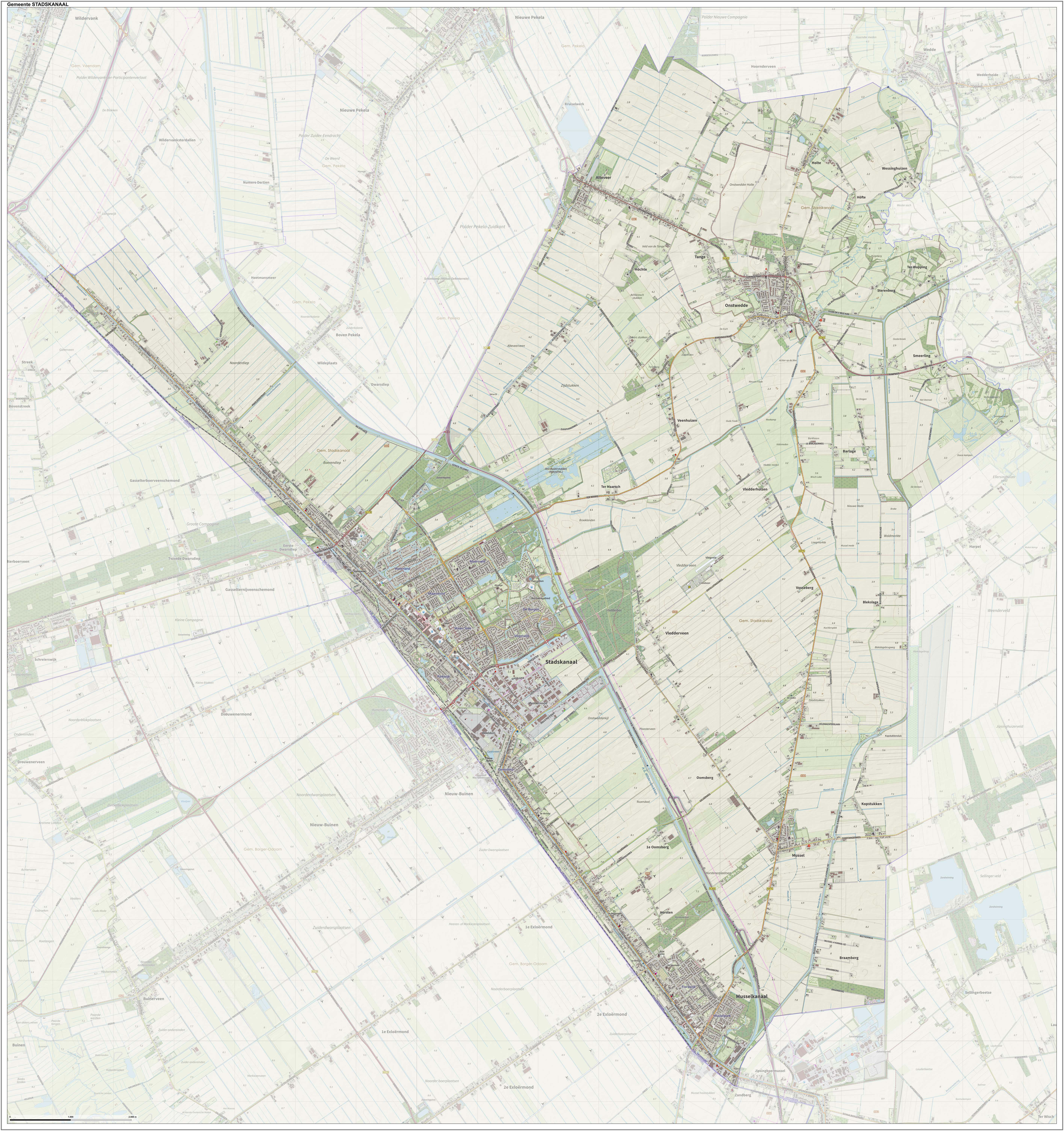 Topografische gemeentekaart. Resolutie: 400 pixels/km. Kaartbeeld samengesteld uit de open geodata van de Top10NL en Top25namen (Kadaster), Creative Commons-BY licentie. Gebouwvlakken uit open geodata BAG extract. Wegen uit de OpenStreetMap, OpenStreetMap community. Reliëfschaduw uit de Actuele Hoogtekaart AHN2. Samenstelling en kleurenschema: Jan-Willem van Aalst, met QGIS. Zie ook de Legenda.